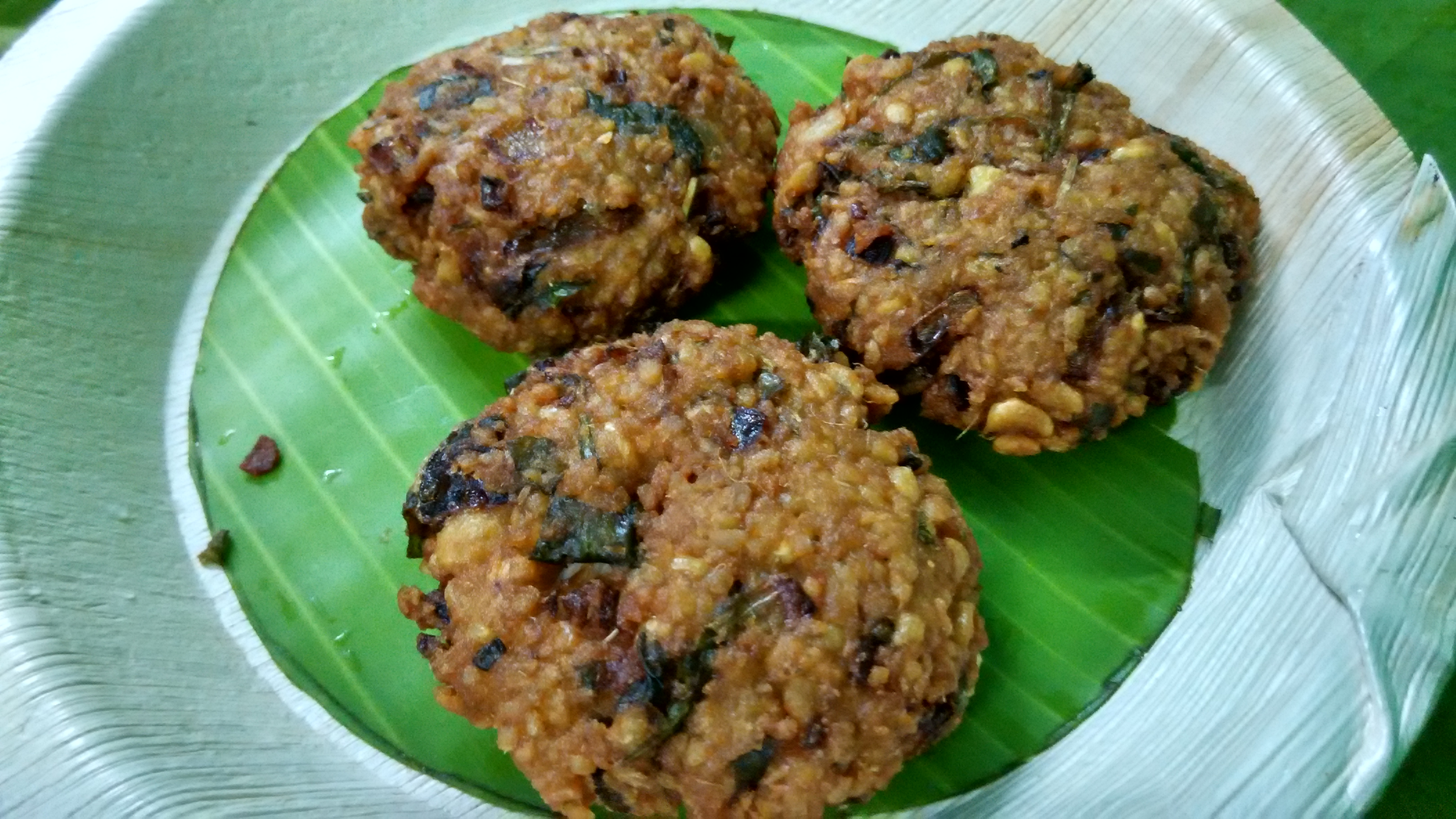 பருப்பு வடை அல்லது ஆமை வடை.